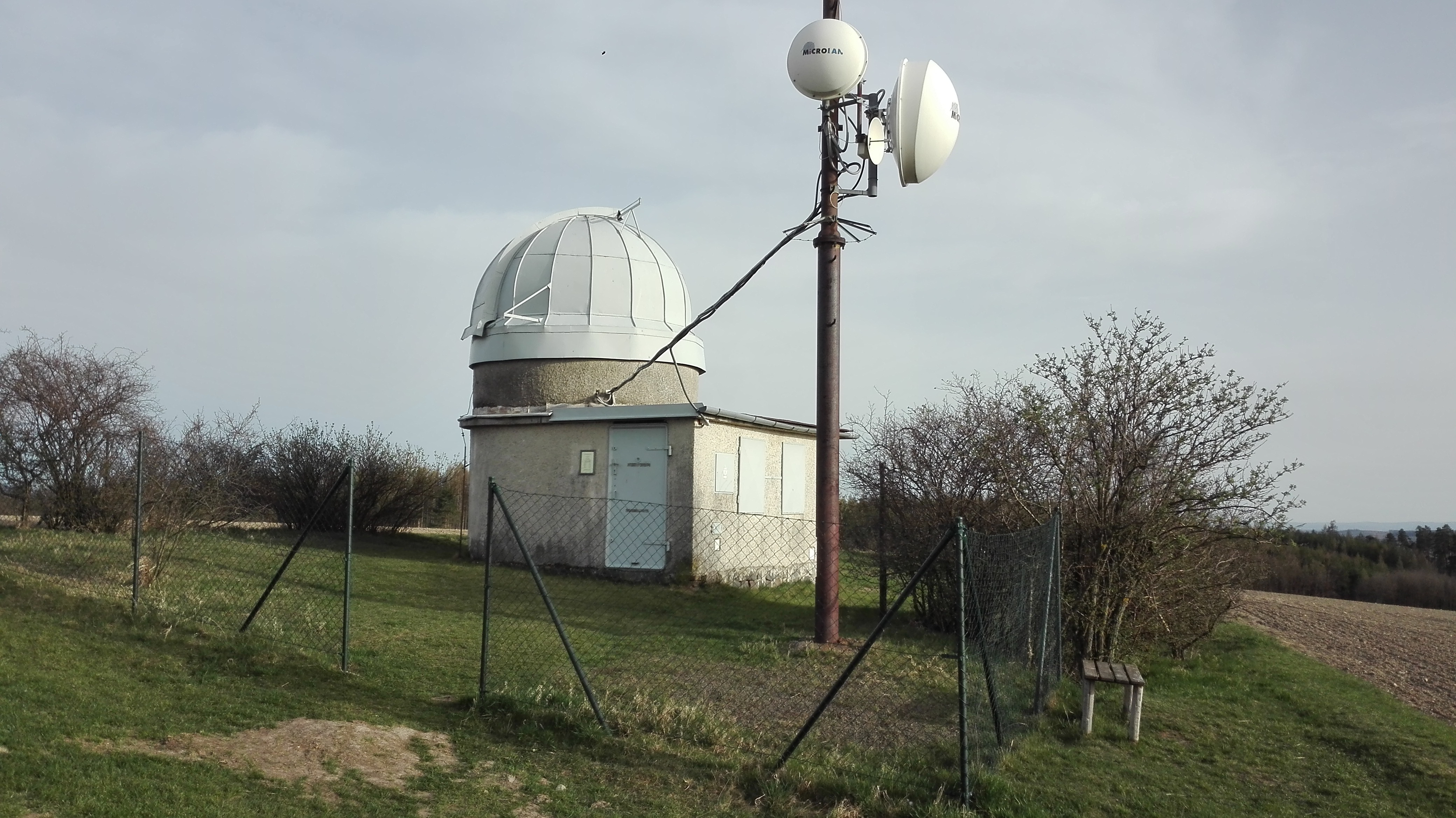 Lošovská hvězdárna